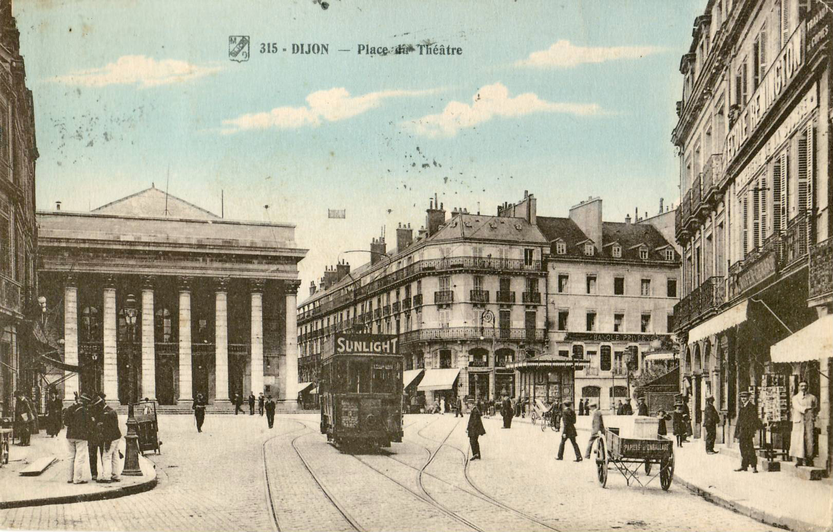 Carte postale ancienne éditée par MD, n°315 : DIJON - Place du Théâtre Vue du tramway urbain